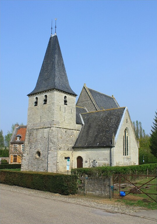 Parochiekerk Sint-Jan, Hoksem